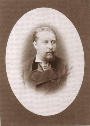 Ludwig I.